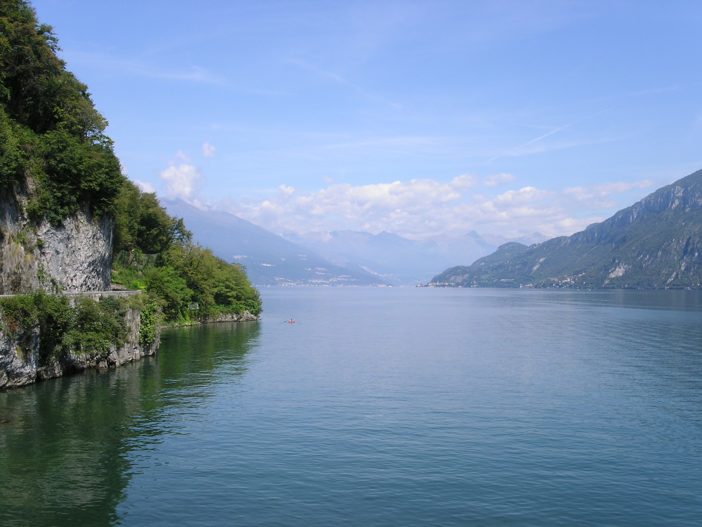 Lago di Lecco